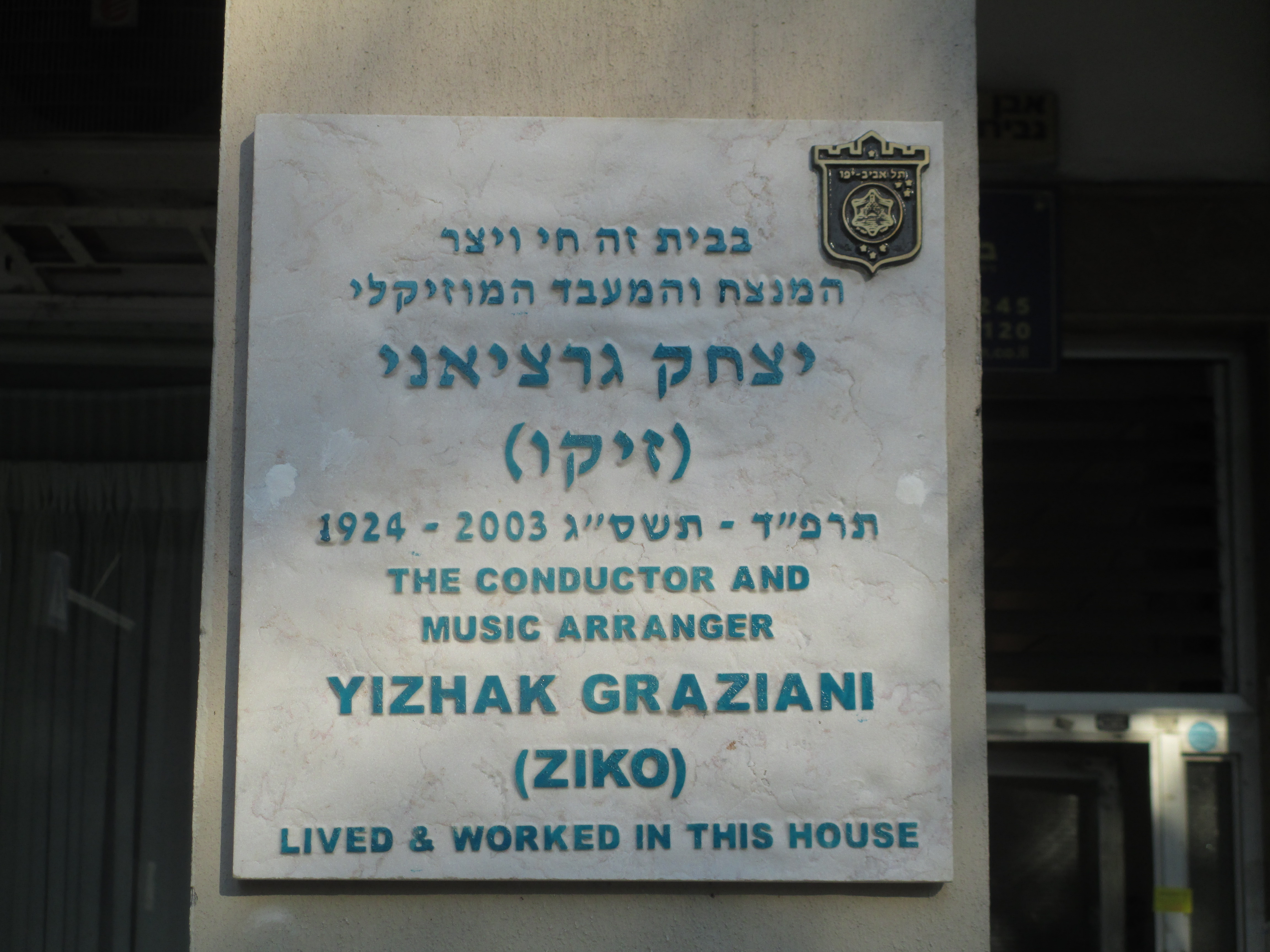 לוחית זיכרון ליצחק גראציאני על ביתו ברחוב אבן גבירול 173 בתל אביב